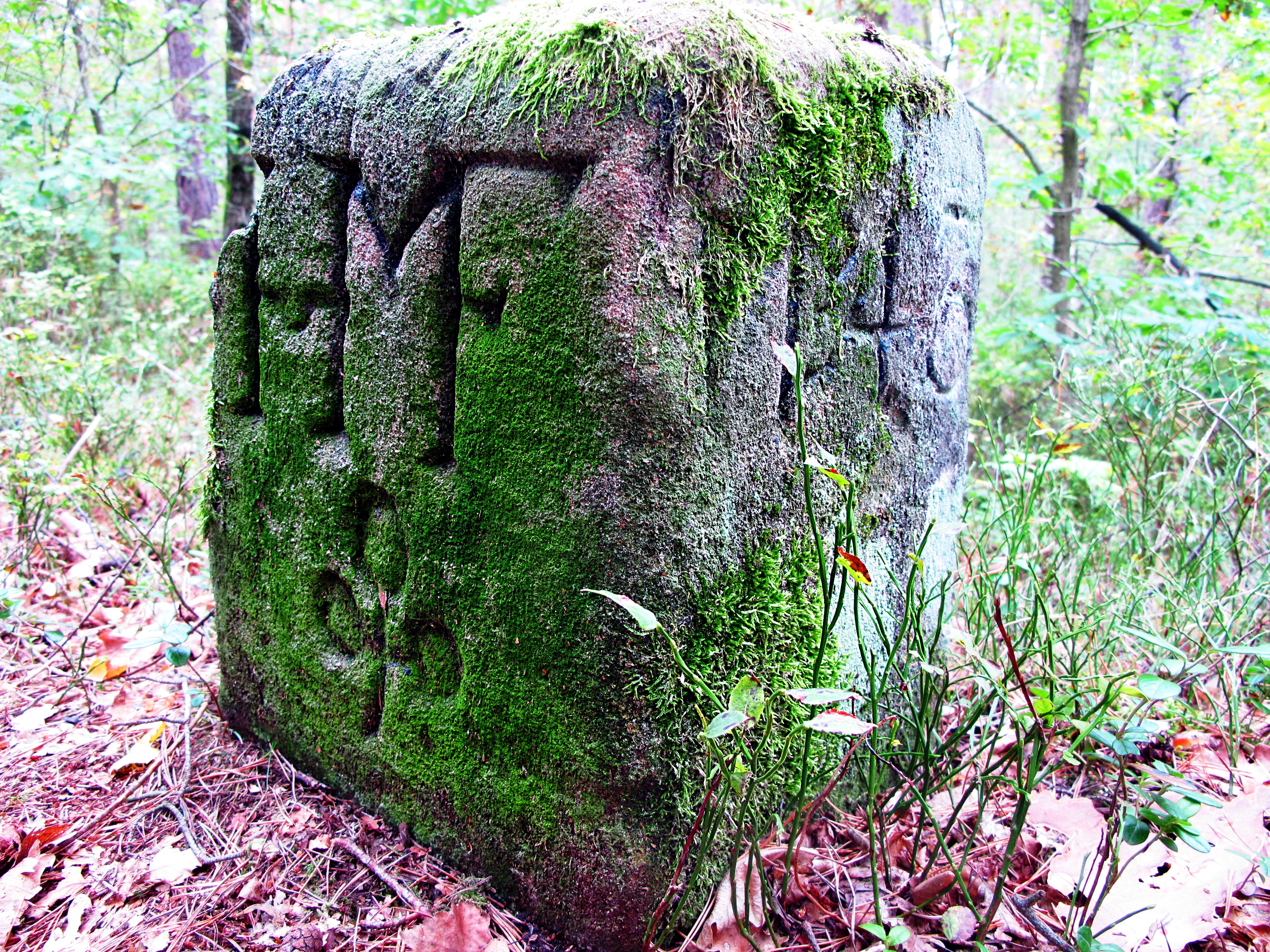 Grenzstein im Fürther Stadtwald. In den Boden eingelassener, quaderförmiger Stein, Höhe über Boden ca. 35 cm, Breite und Tiefe je ca 30 cm. Auf der Nordseite sind die zusammengezogenen Buchstaben "HMF" und ein Kleeblatt als Symbol der Stadt Fürth zu erkennen. Die Westseite trägt die Zeichen "1°43". Auf der Oberseite zeigt eine Rinne den Grenzverlauf. Dieser Stein ist ein besser erhaltenes Exemplar einer ganzer Reihe von Grenzsteinen, die sich im Abstand von ca 20-50m durch den Wald ziehen und durch schmale Wege verbunden sind. Koordinaten: N49 28.115 E10 56.026